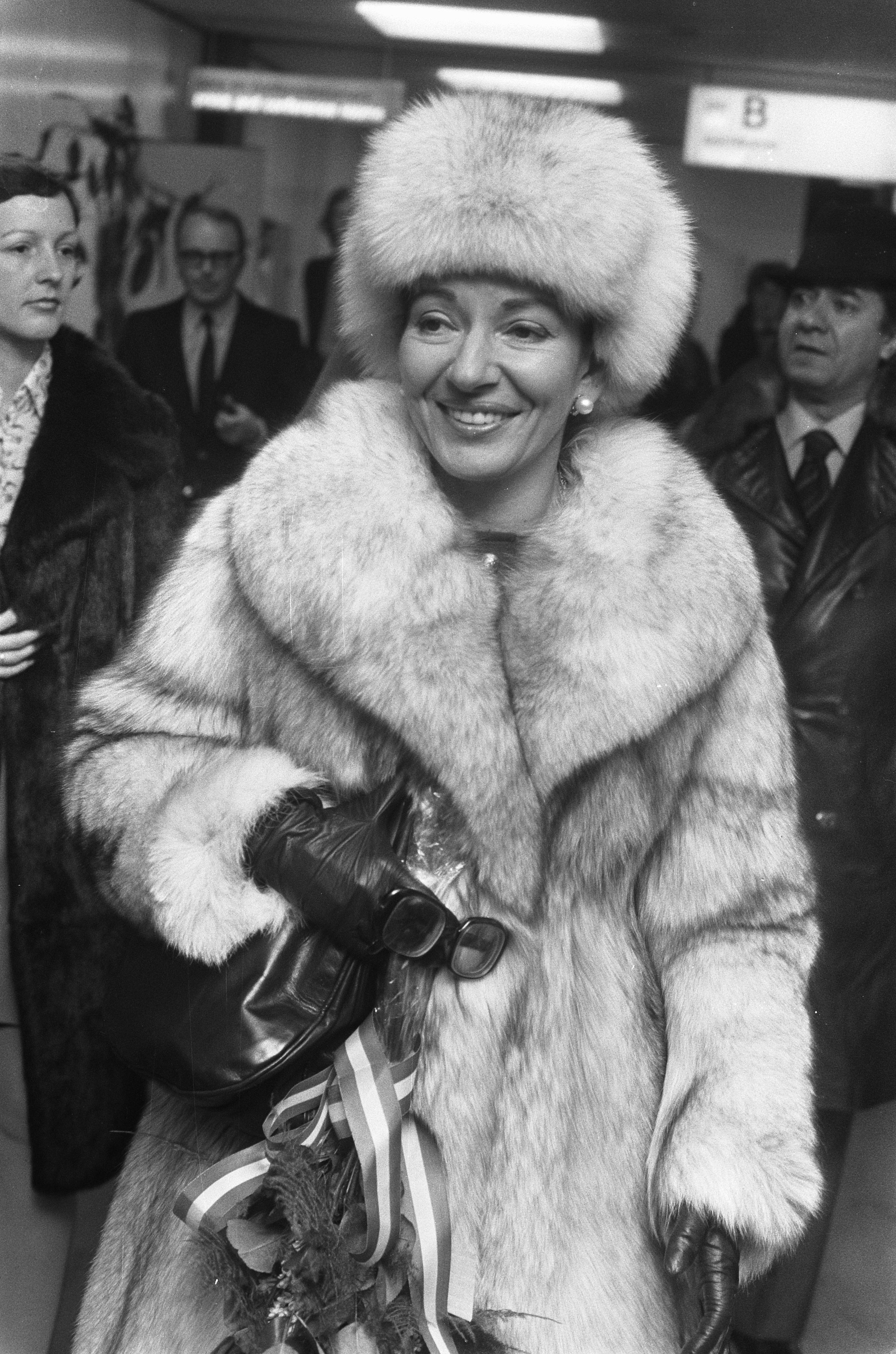 Collectie / Archief : Fotocollectie Anefo Reportage / Serie : Maria Callas op Schiphol Beschrijving : Een portret van de zangeres Annotatie : Maria Callas was bezig aan haar afscheidstournee Datum : 9 december 1973 Locatie : Noord-Holland, Schiphol Trefwoorden : portretten, sopranen, zangeressen Persoonsnaam : Callas, Maria Fotograaf : Bert Verhoeff / Anefo Auteursrechthebbende : Nationaal Archief Materiaalsoort : Negatief (zwart/wit) Nummer archiefinventaris : bekijk toegang 2.24.01.05 Bestanddeelnummer : 926-8776